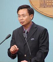 中華民國外交部部長黃志芳出席中華民國總統府記者會。